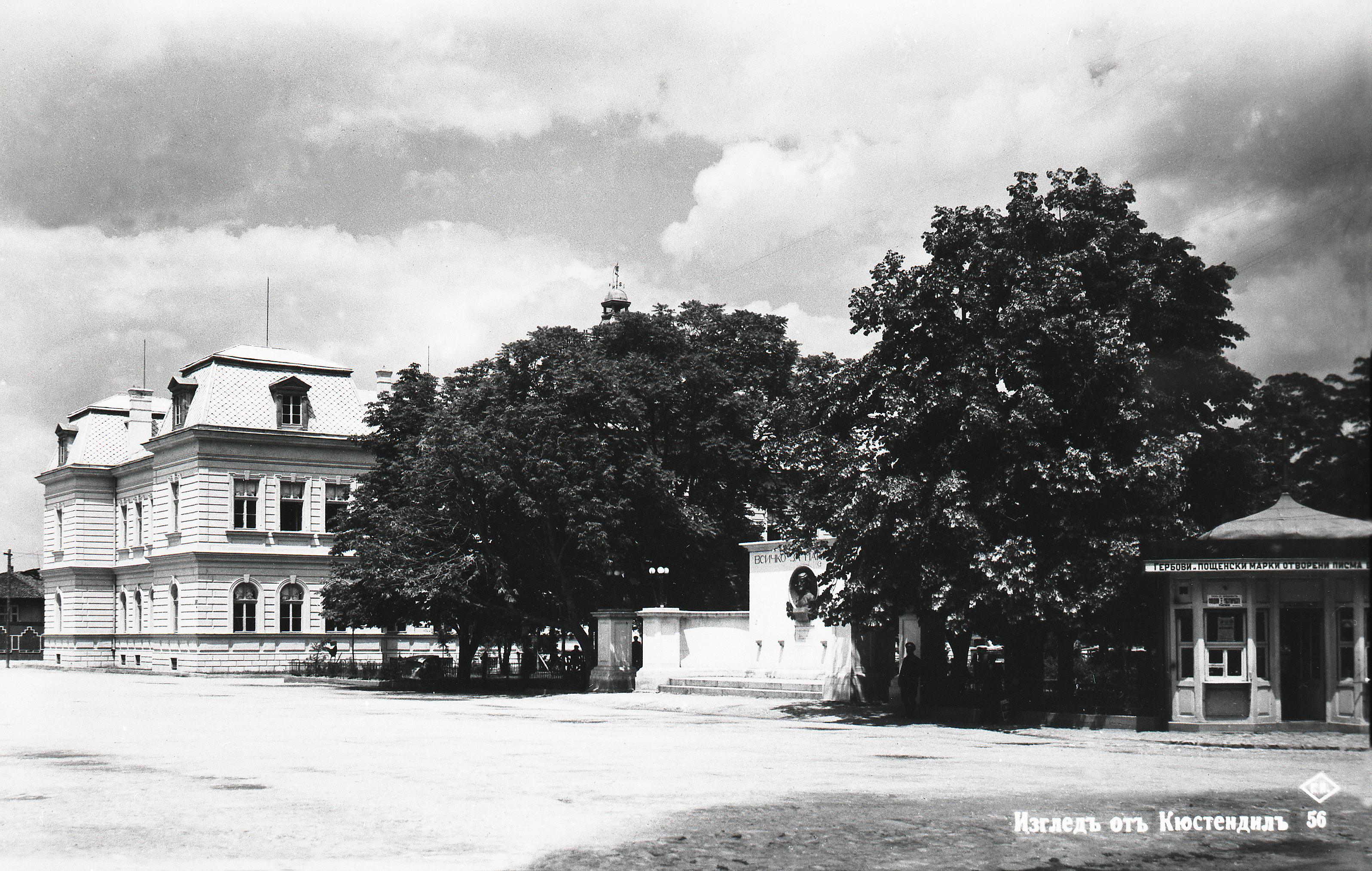 гр.Кюстендил, началото на ХХ век.